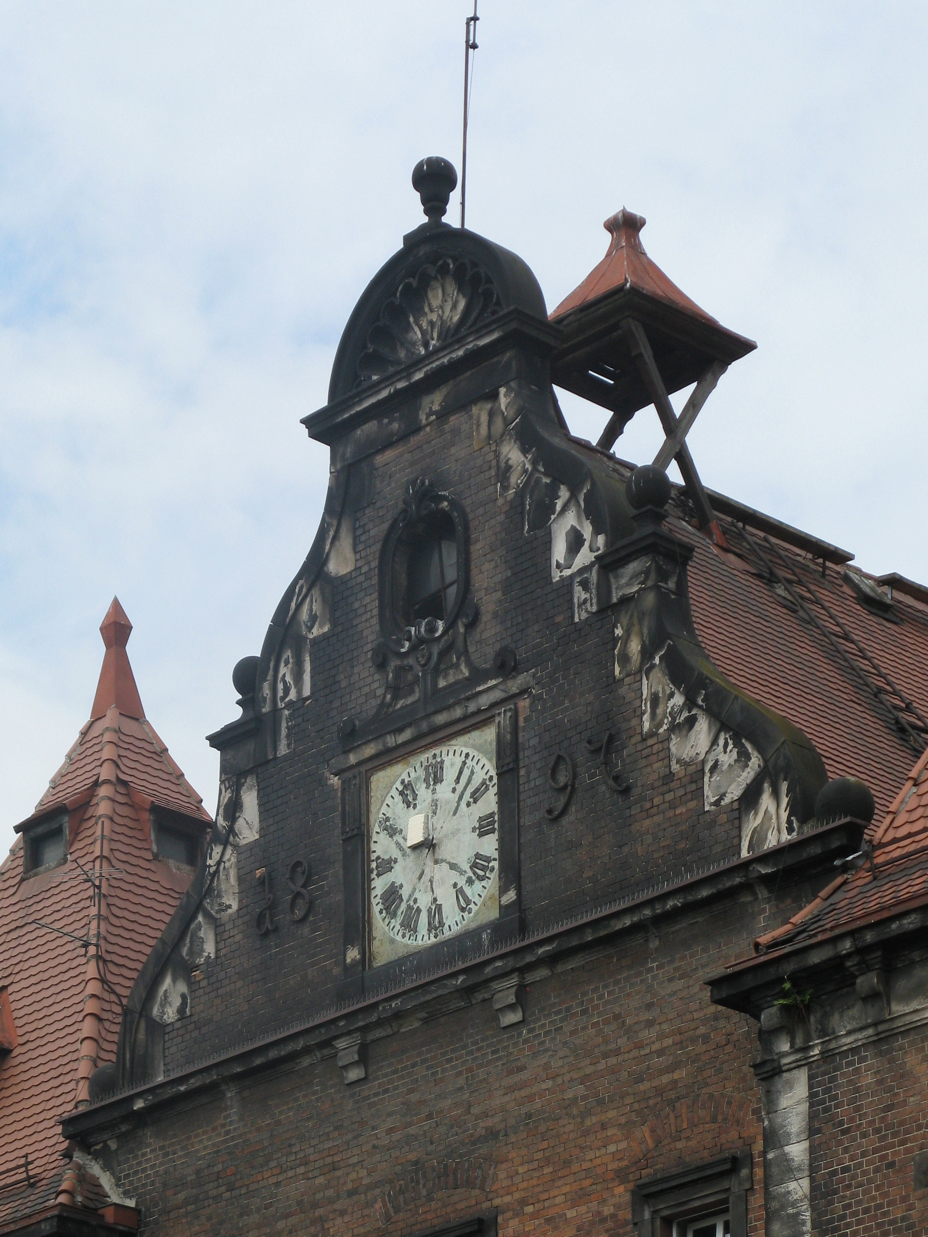 Dawna siedziba Dyrekcji Kopalń i Hut Donnersmarcków w Świętochłowicach, ul. Katowicka 30, szczyt.